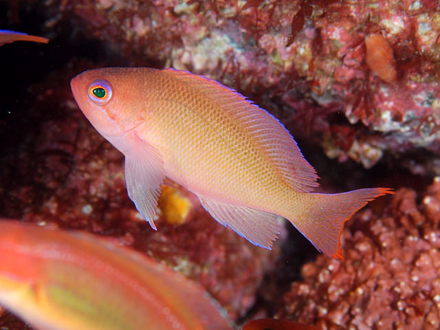 ケラマハナダイyg Pseudanthias hypselosoma